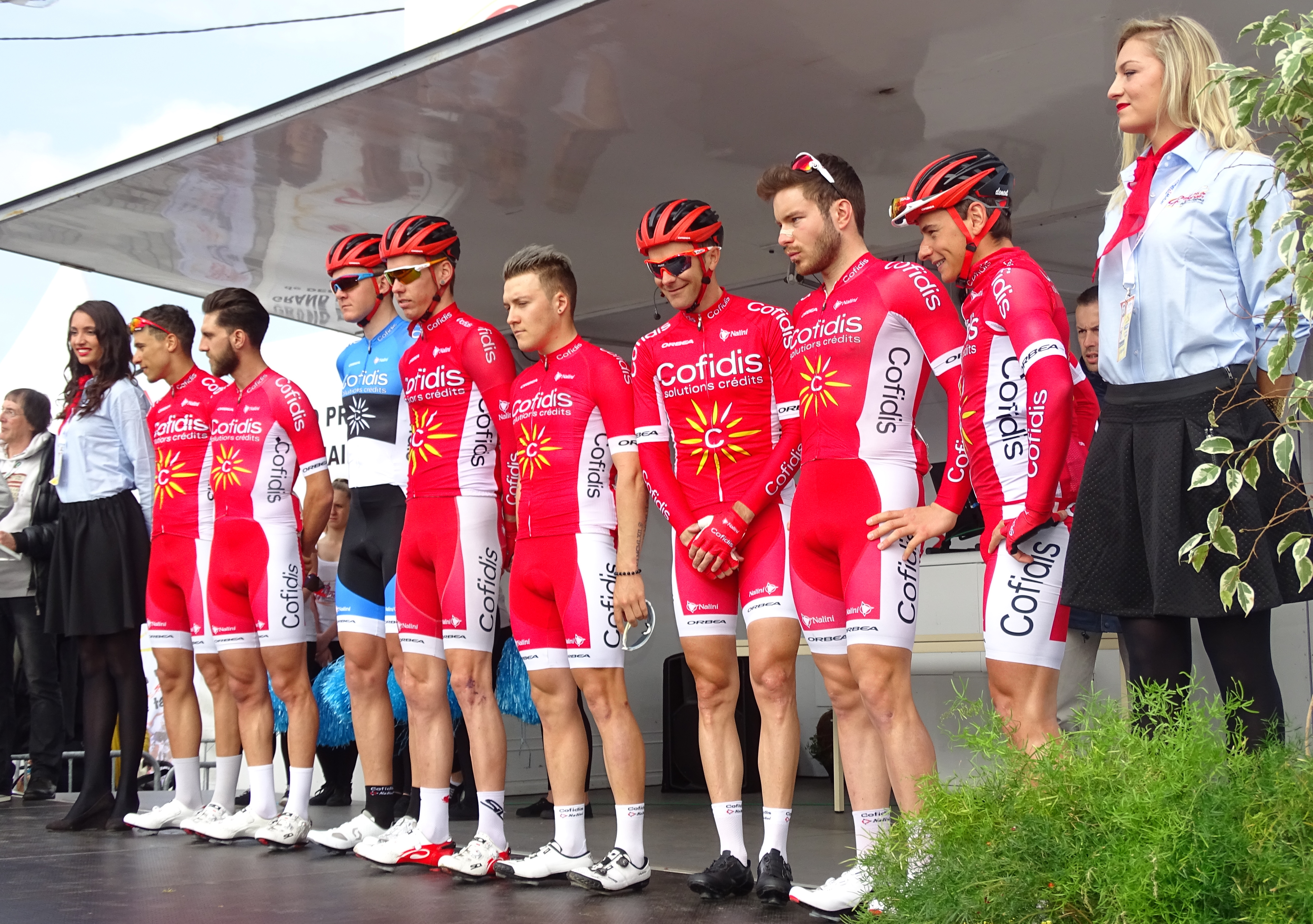 Reportage réalisé le jeudi 14 avril à l'occasion du départ et de l'arrivée du Grand Prix de Denain 2016 à Denain, Nord, Nord-Pas-de-Calais-Picardie, France.